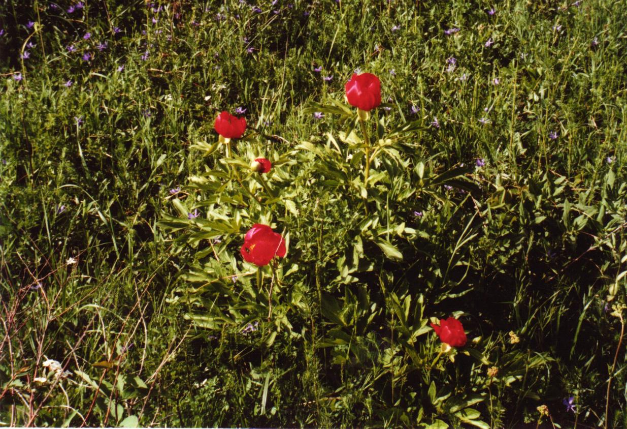 Pied de pivoines poussant près du monument du Champ des Merles